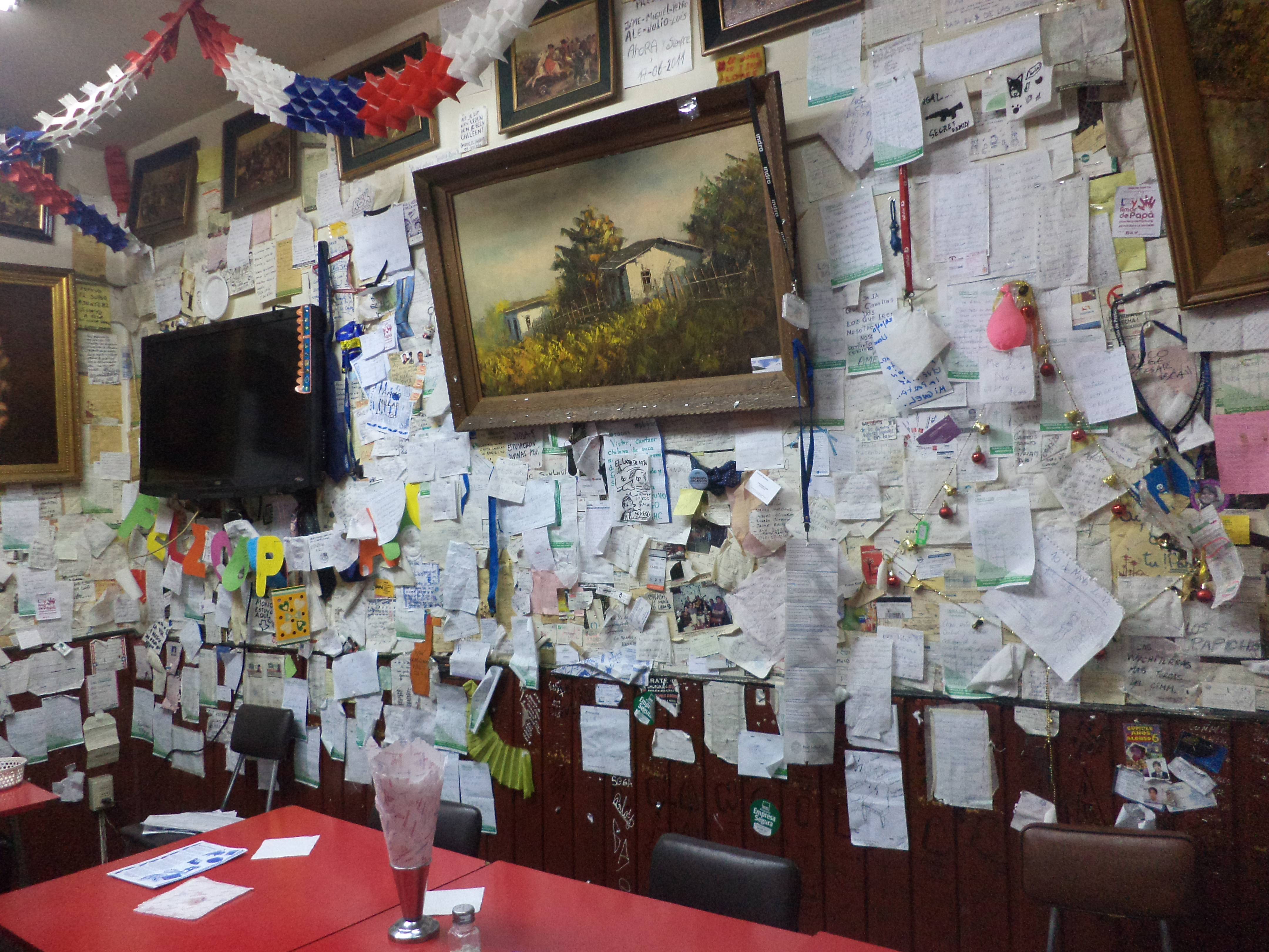 Tradicionas restaurante chileno fundado en 1980 como un clandestino de opositores al régimen militar.